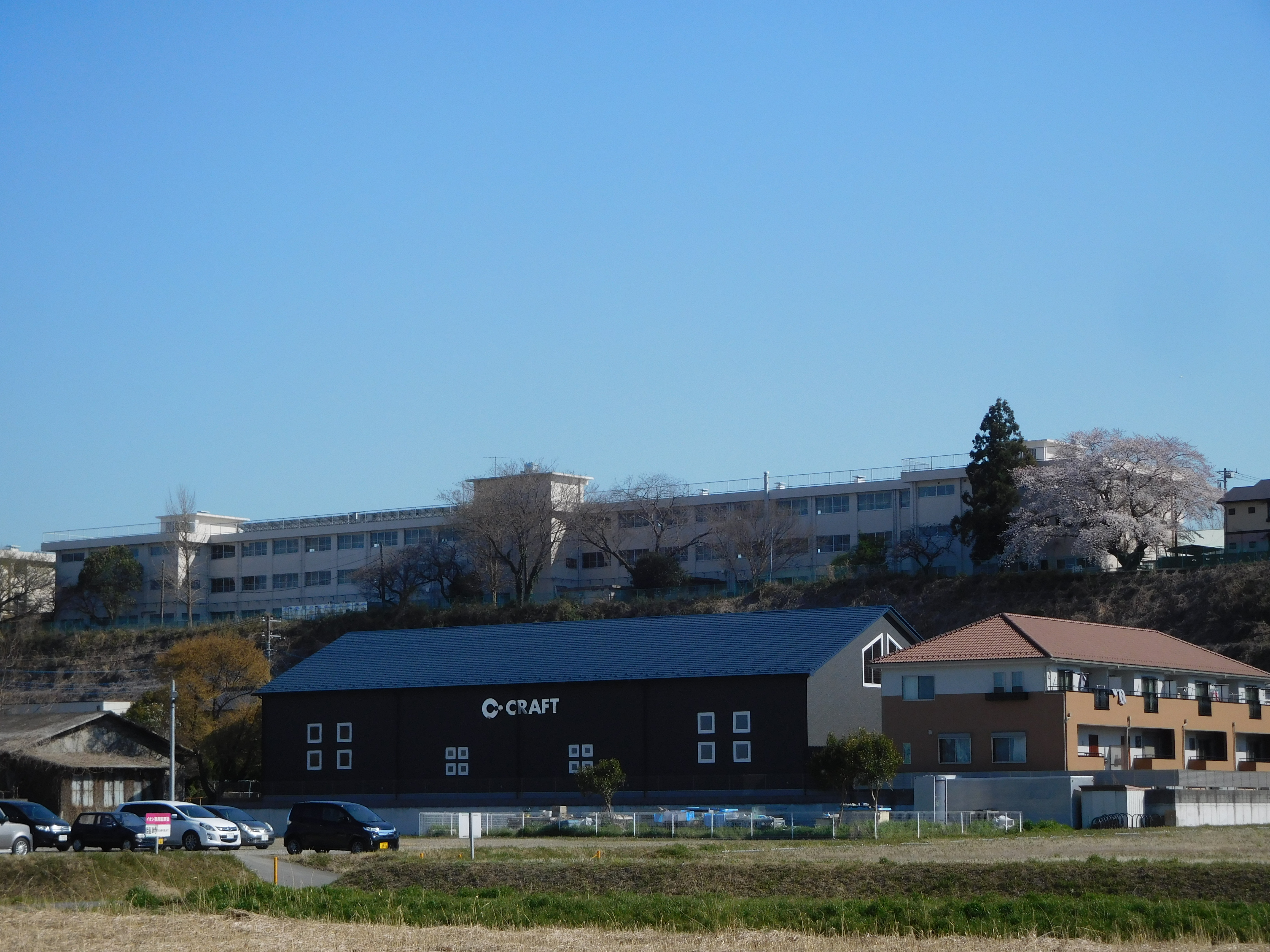 茨城県土浦市下高津四丁目にある、土浦市立下高津小学校。